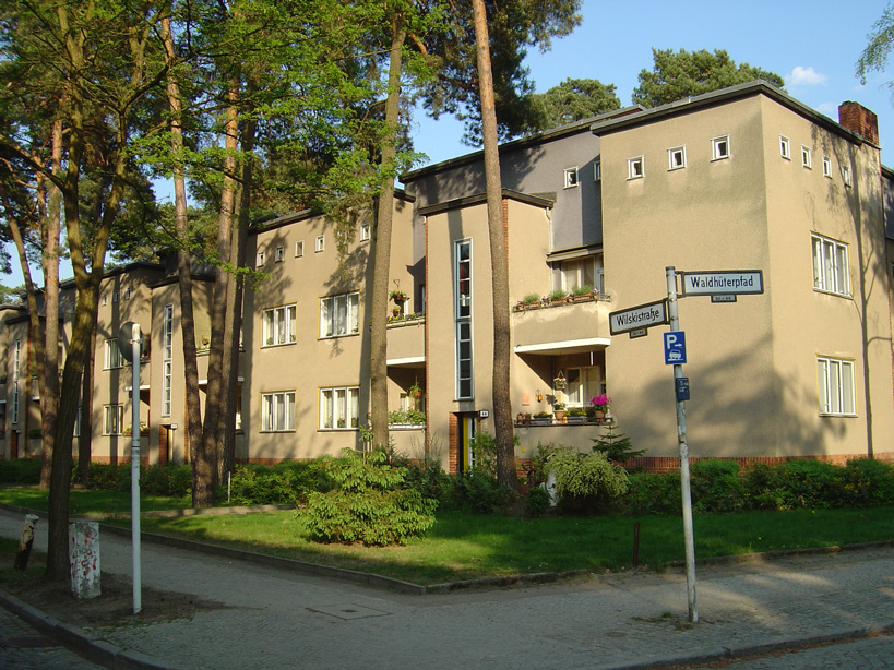 House in Onkel Toms Hütte, Wilskistrasse, Berlin, Germany